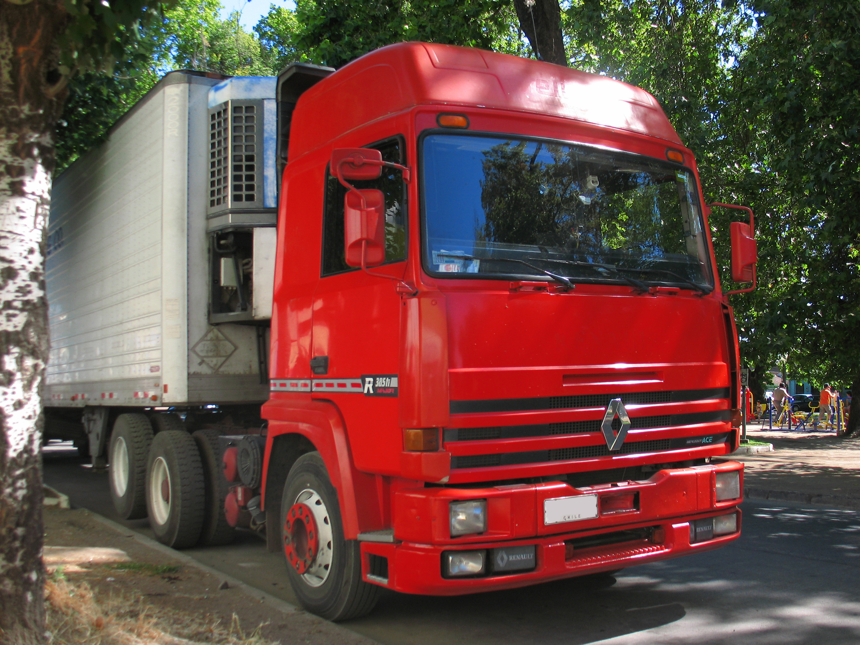 Renault R 358 Ti Major 1997